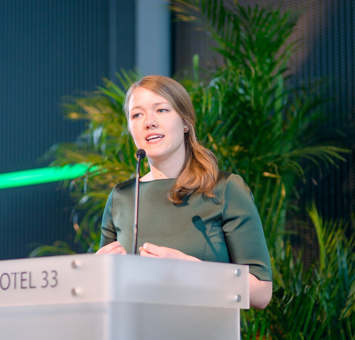 Bastholm på De Grønnes landsmøte 2016